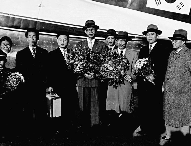 촬영일 : 1954년 04월 19일 촬영장소 : 대한민국 경기도 김포공항 참석자 : 임병직 주국제연합대사(왼쪽에서 세번째), 변영태 외무부 장관(왼쪽에서 네번째), 홍진기 법무부 차관(왼쪽에서 다섯번째) 관련내용 : 변영태 외무장관 등 한국대표단이 제네바회담 참석차 출국하였다.